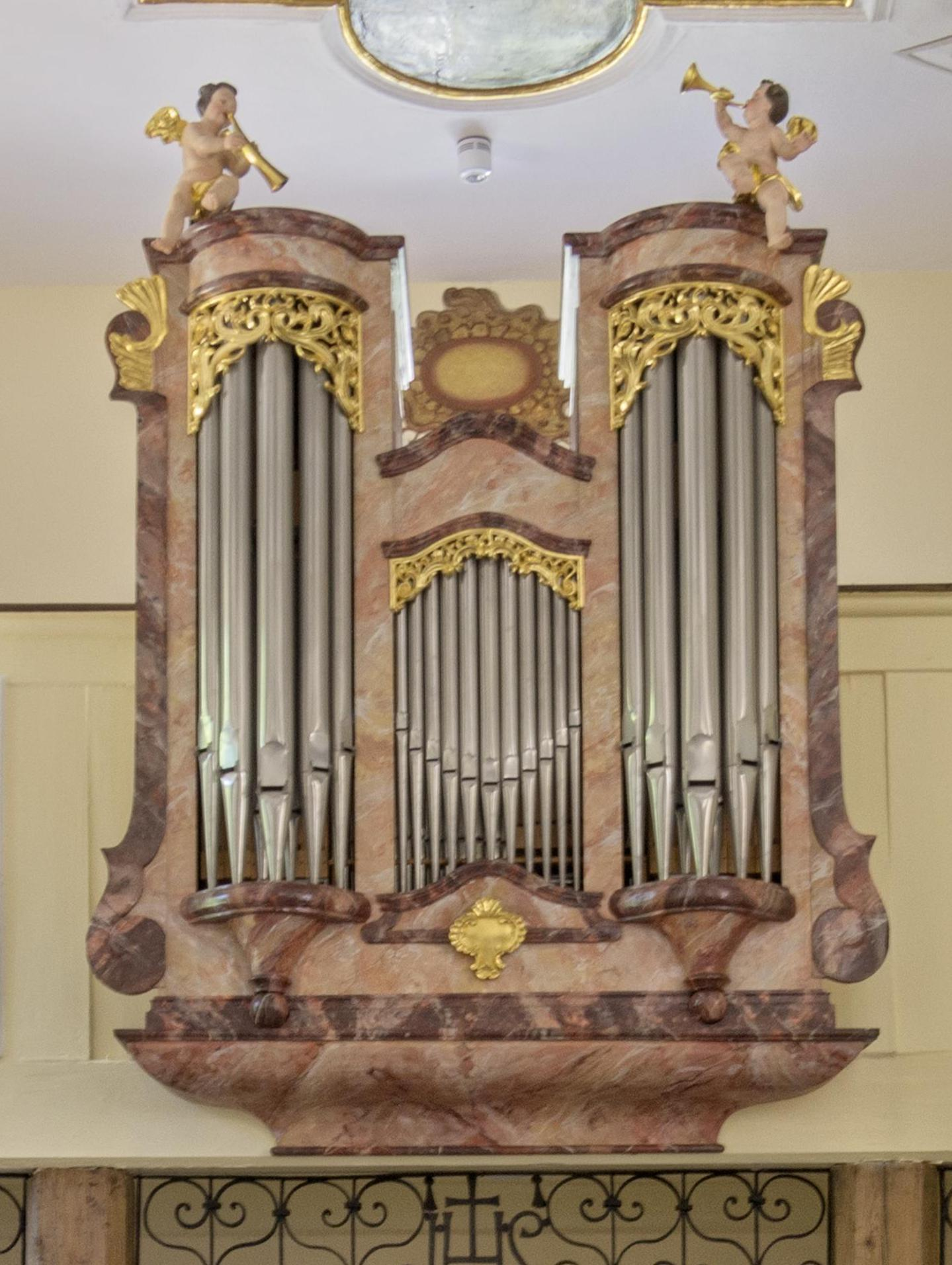 Bilder von der Giersbergkapelle